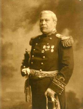 Valte. Eduardo O'Connor.